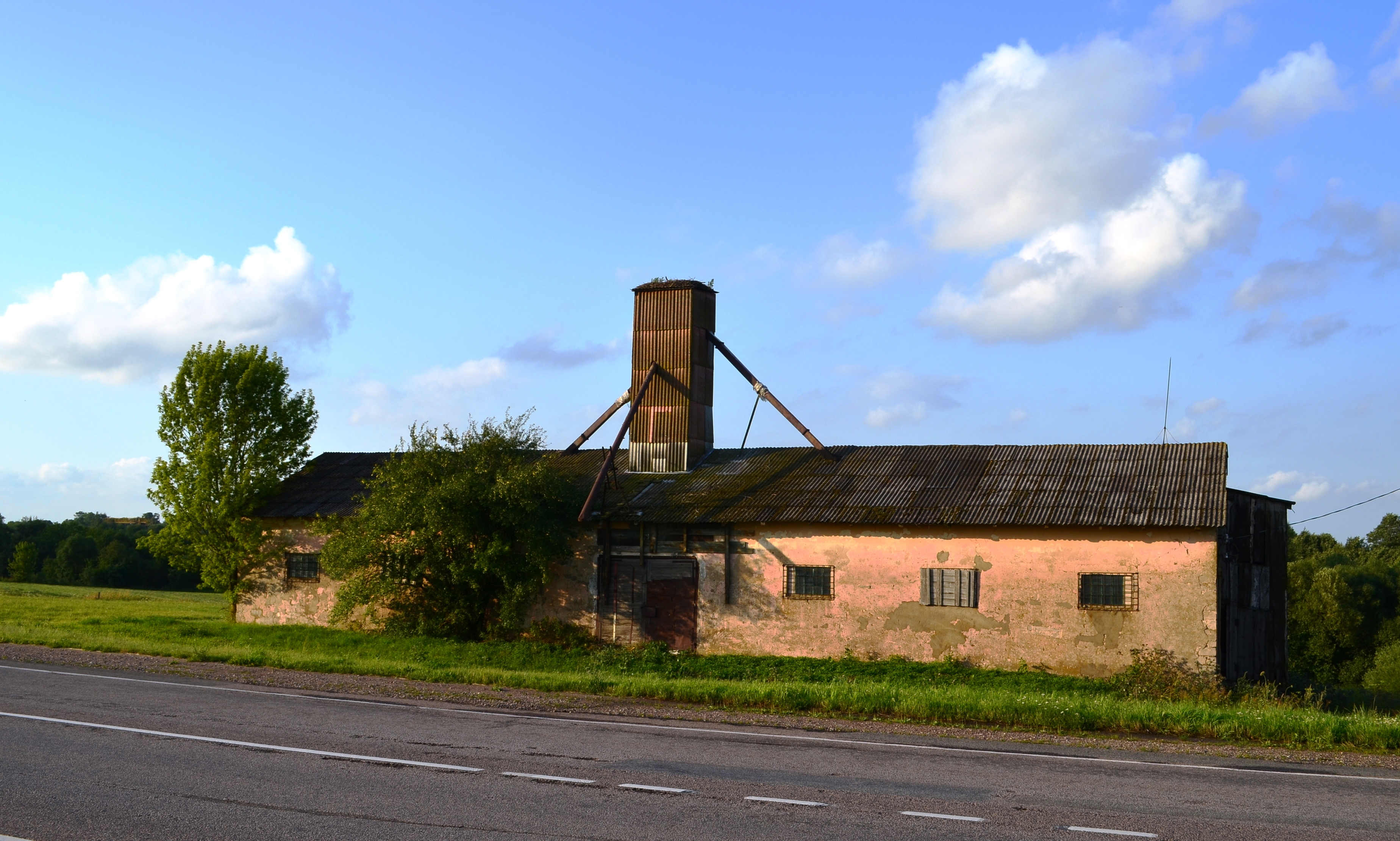 Senas ūkinis pastatas, Urnėžiai, Kėdainių r.